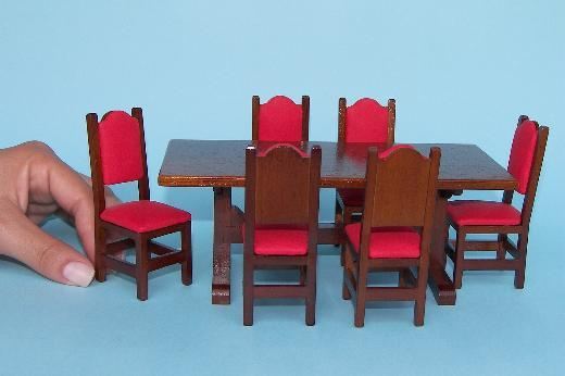 Miniatura de mesa Rústica com 06 cadeiras revestido em couro vermelho na Escala 1:12